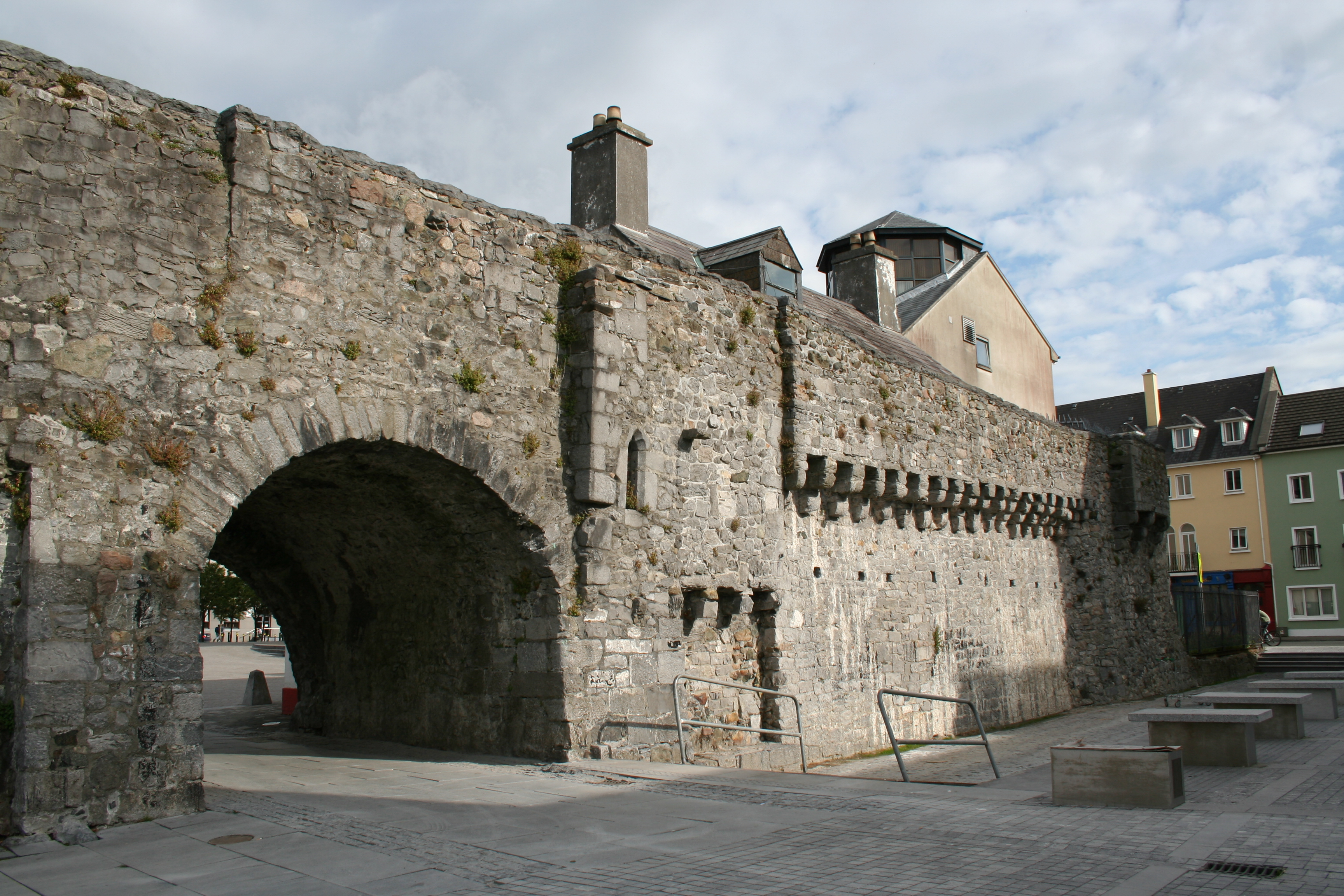 Galway arco español